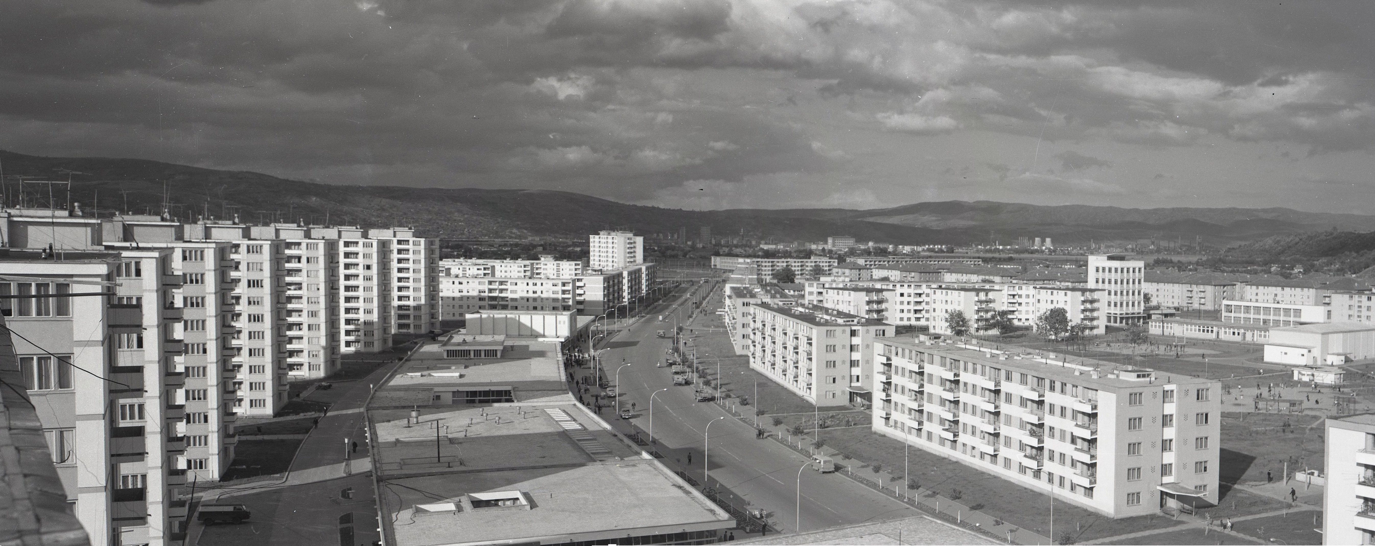 Vedere de ansamblu a orașului